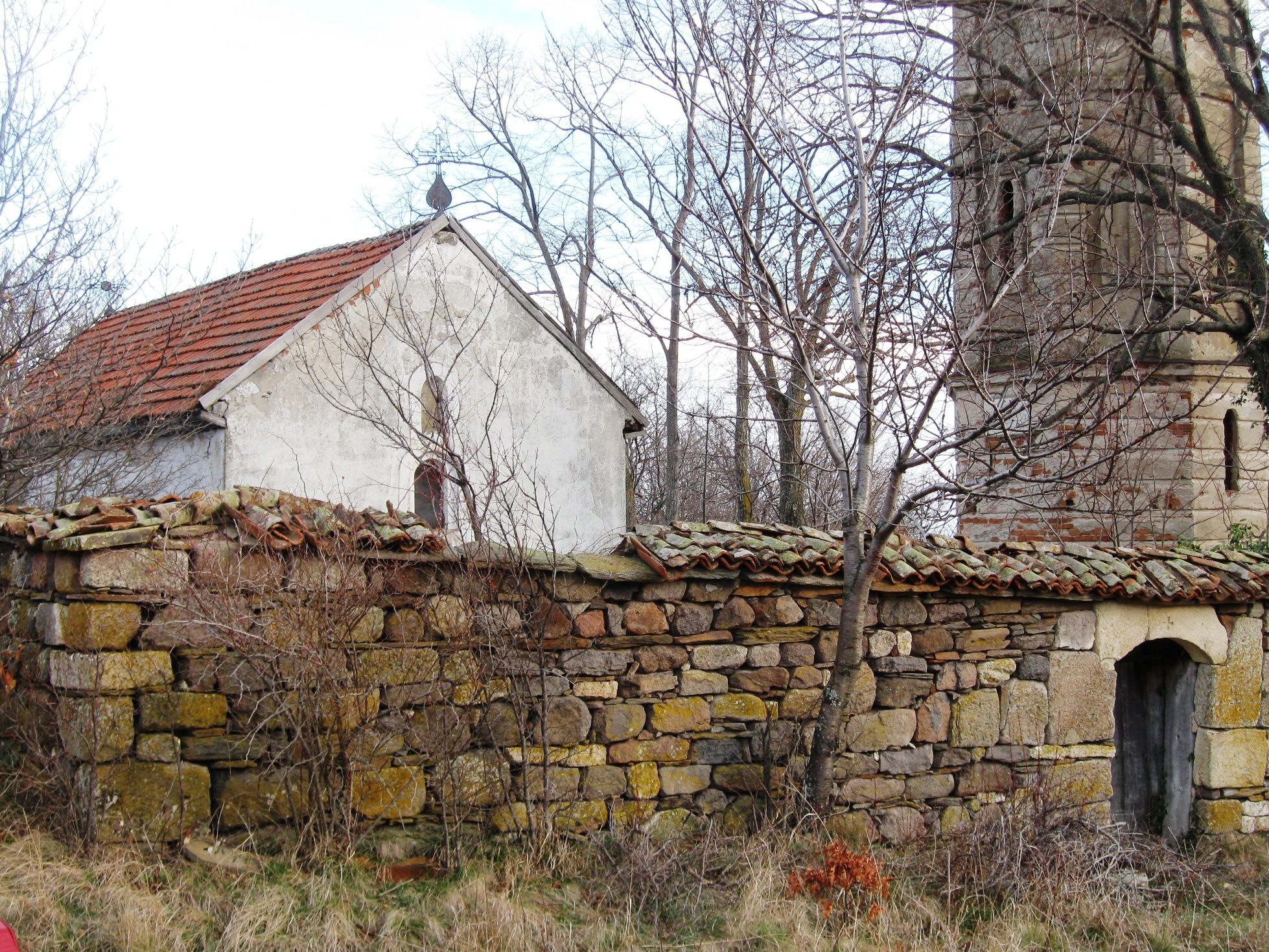 Црква у Ображди